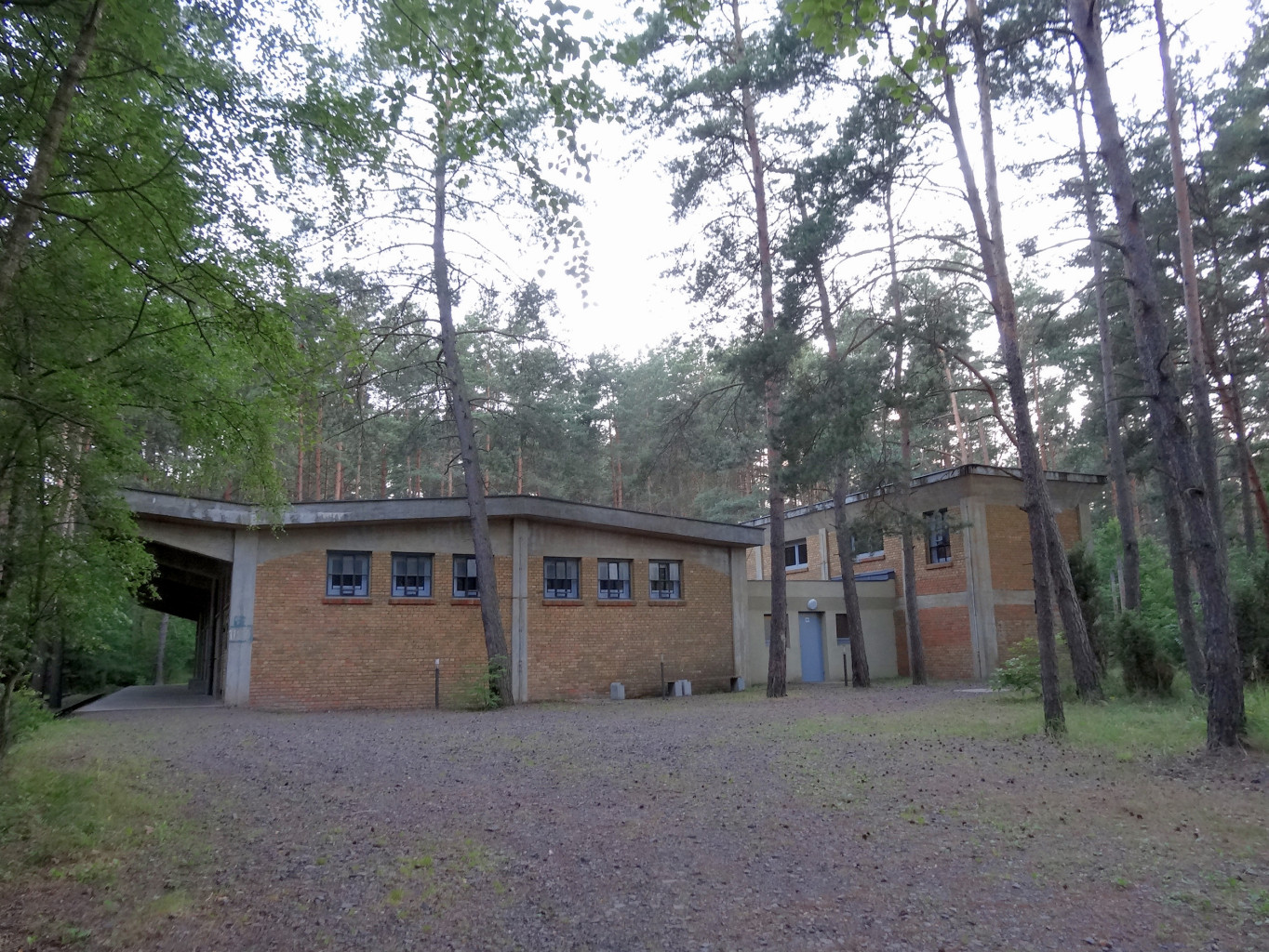 Obiekty zewnętrzne na terenie Eksploseum w Bydgoszczy - oddział Muzeum Okręgowego im. Leona Wyczółkowskiego w Bydgoszczy, prezentująca architekturę przemysłową III Rzeszy na obszarze DAG Fabrik Bromberg